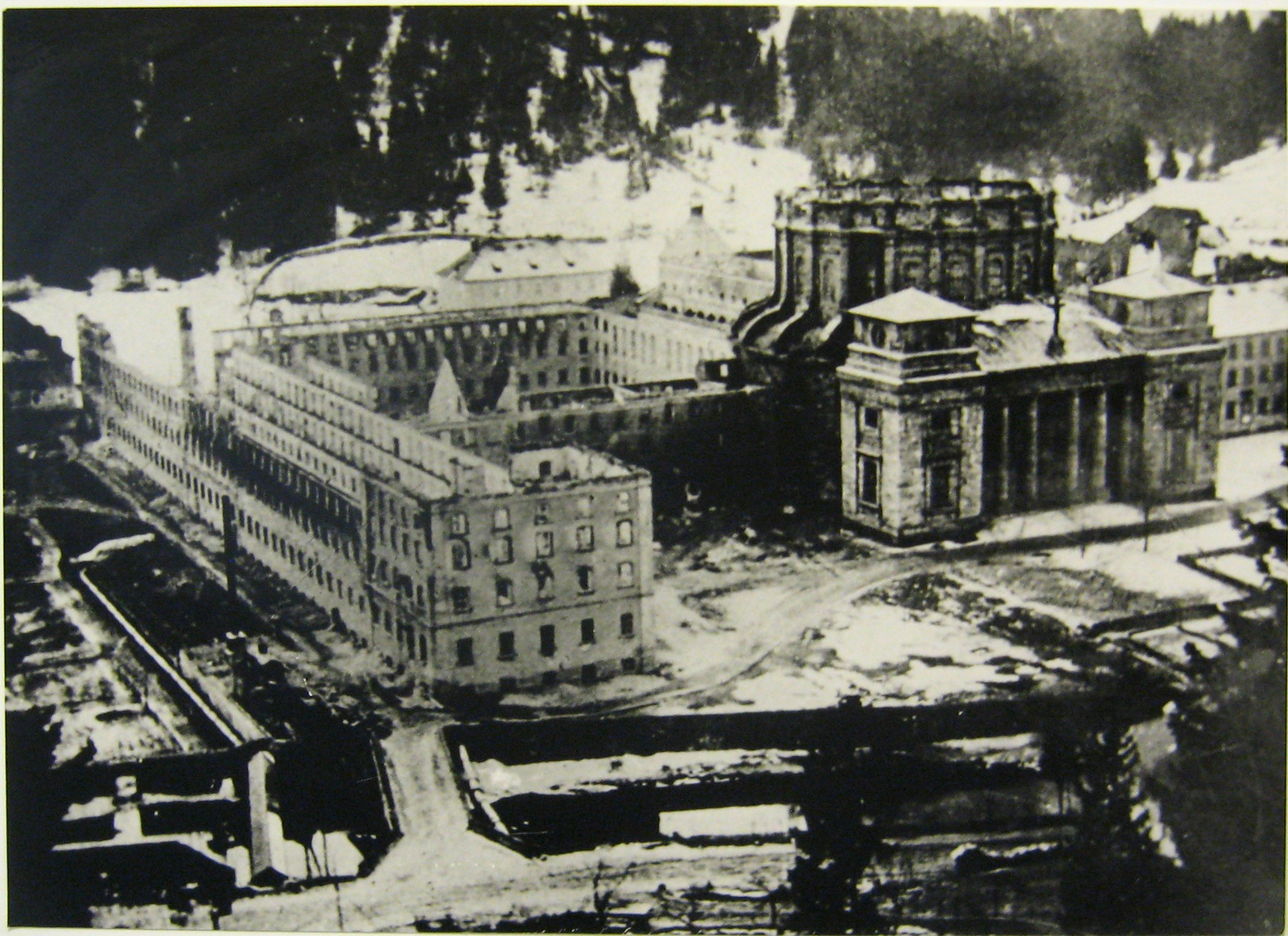 Feuersbrunst 1874 im Dom Sankt Blasien